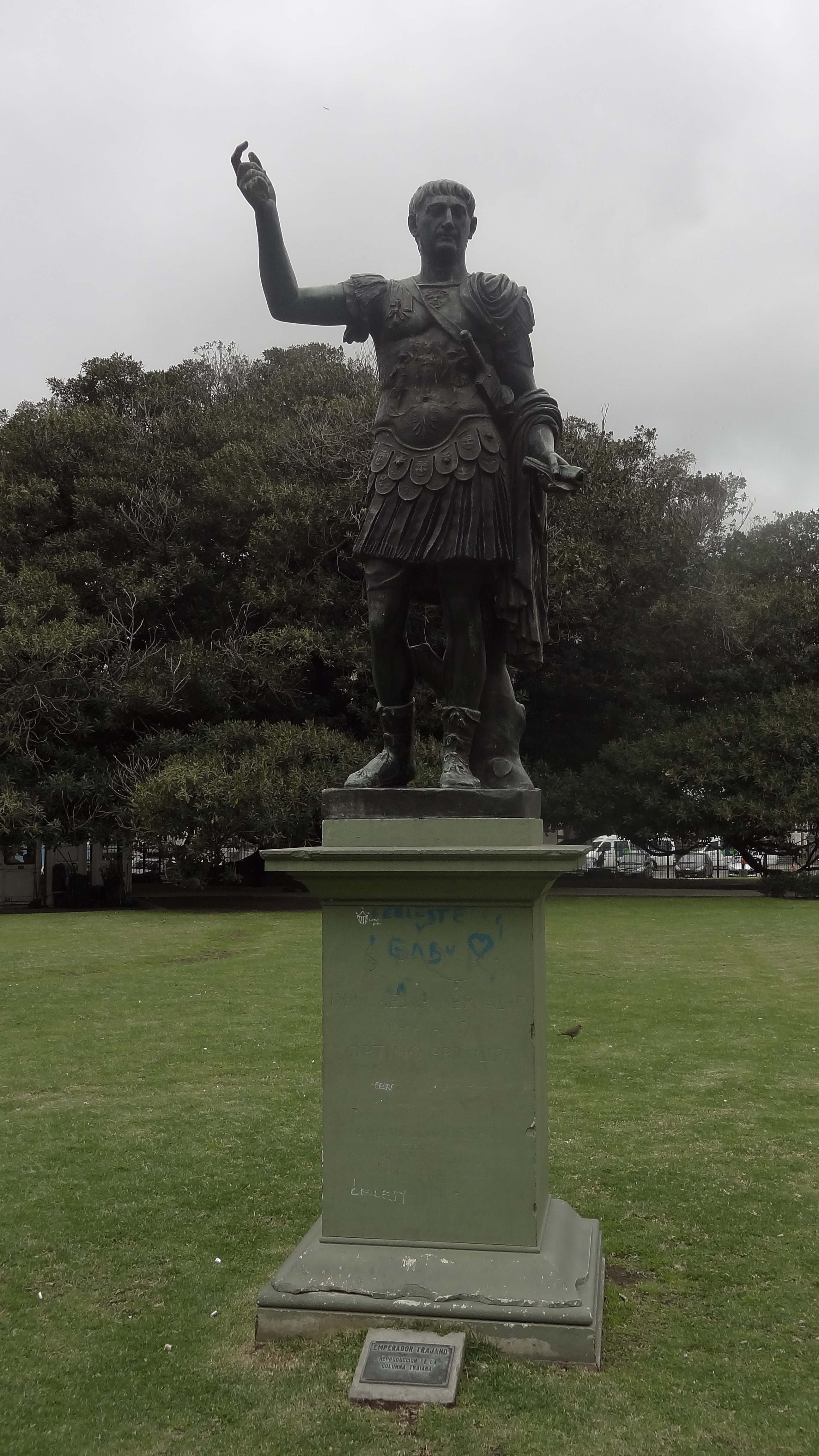 Monumento al emperador Ulpio Trajano